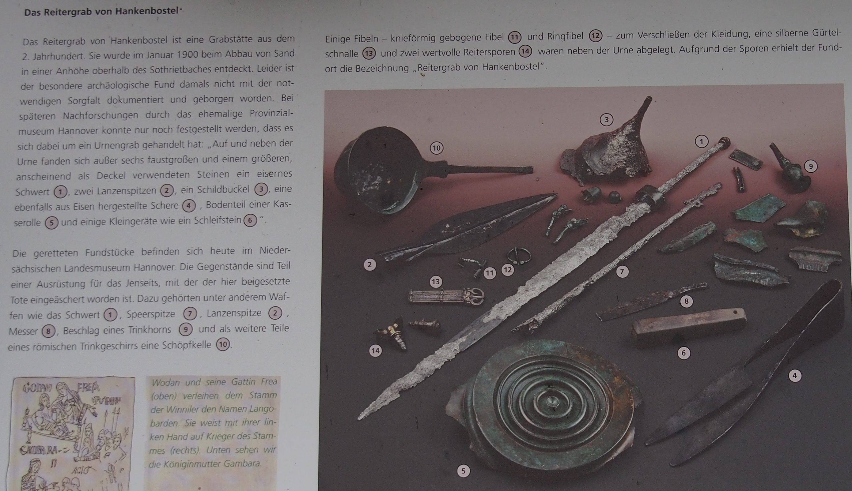 Fundstücke aus dem Brandgrab Hankenbostel, Gemeinde Faßberg (Landkreis Celle) 2.Jahrhundert n. Chr. (Bilder des Landesmuseums Hannover auf öffentlicher Schautafel)